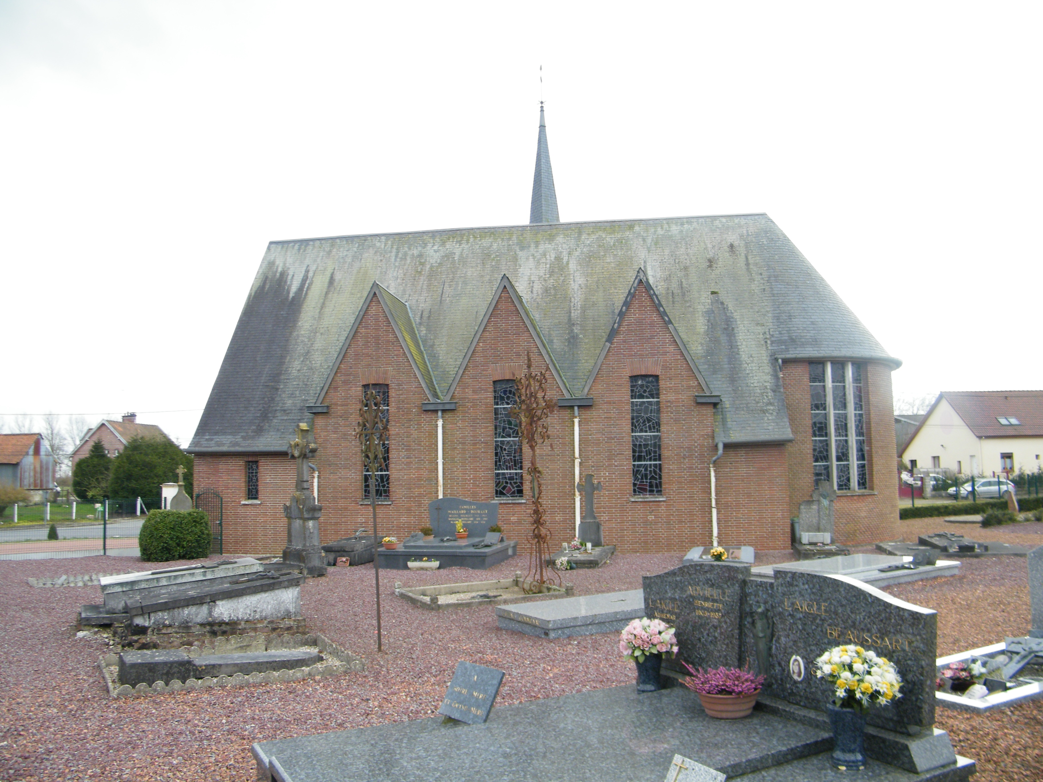 église 2